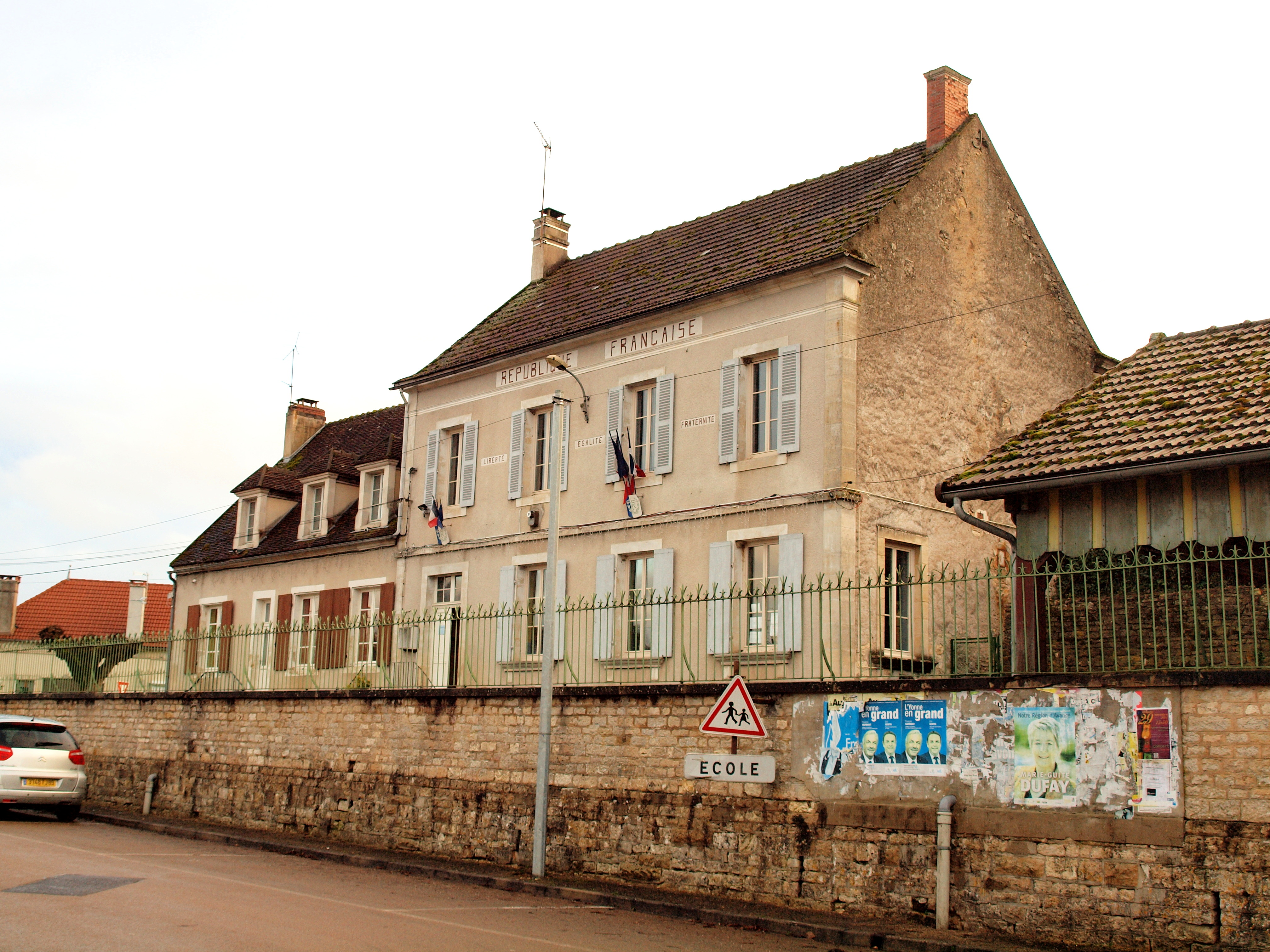 Andryes (Yonne, France) , la mairie-école